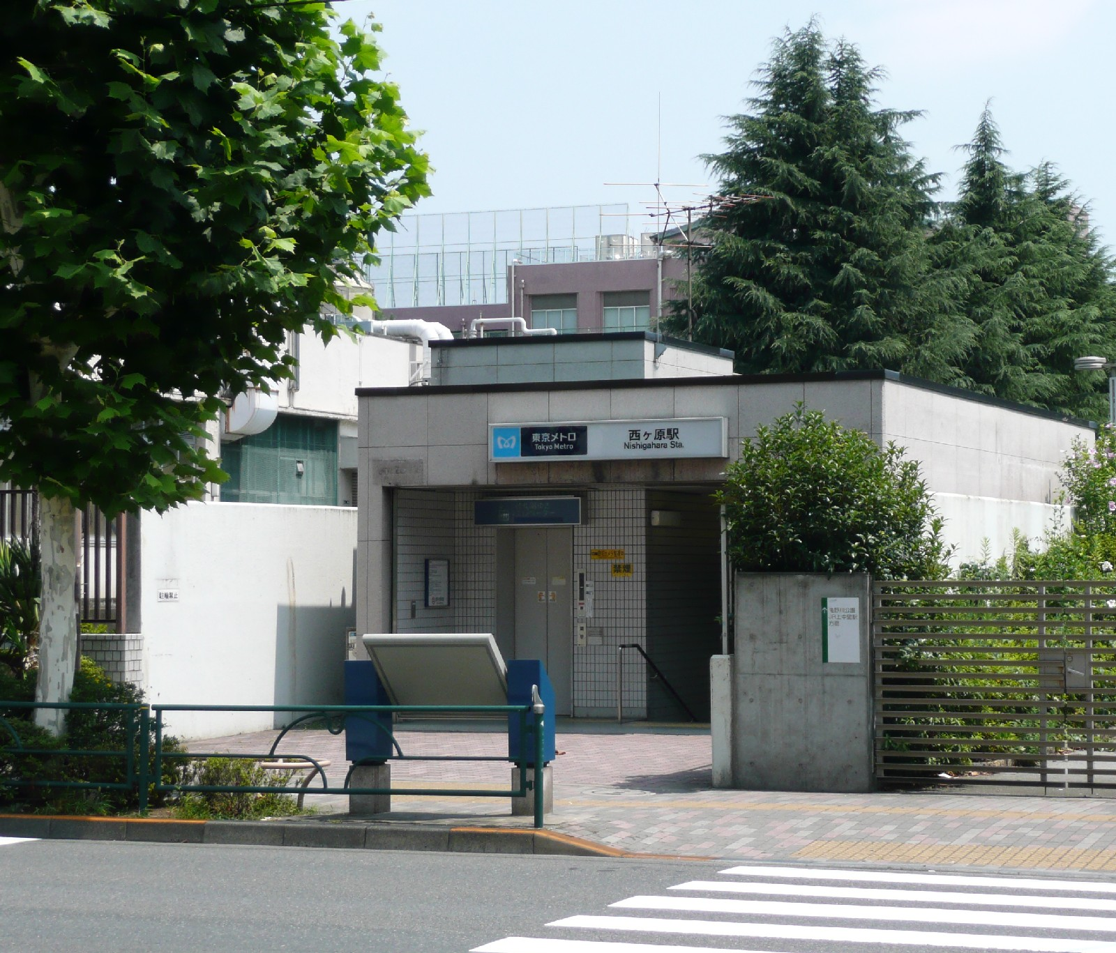 西ヶ原駅1番出入口